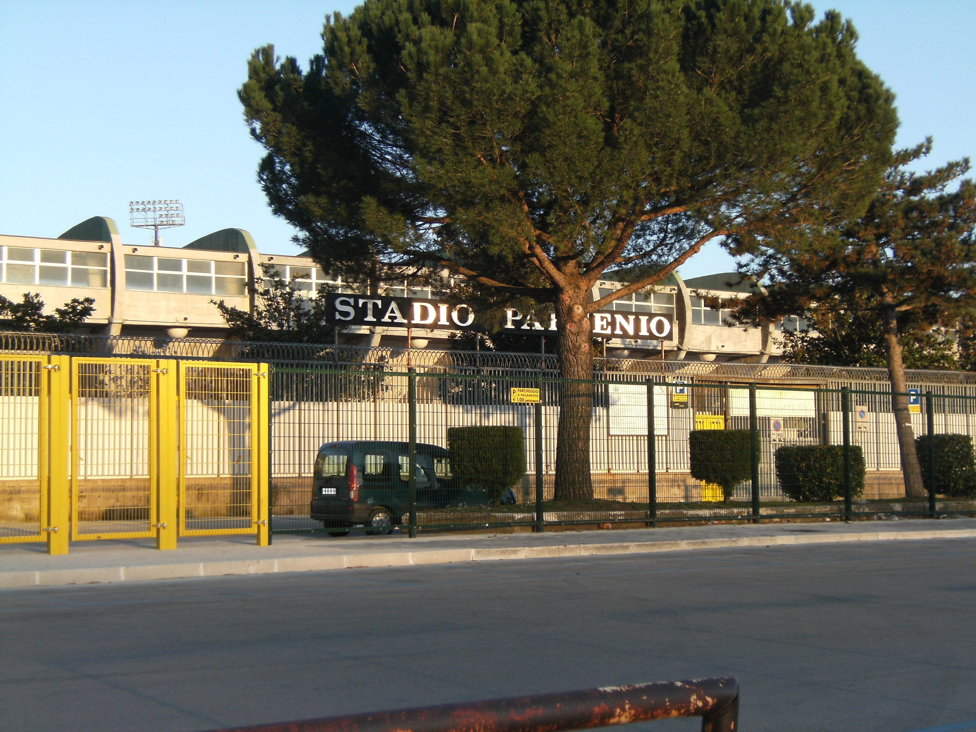 Esterno stadio Partenio di Avellino - Vista tribuna Montevergine